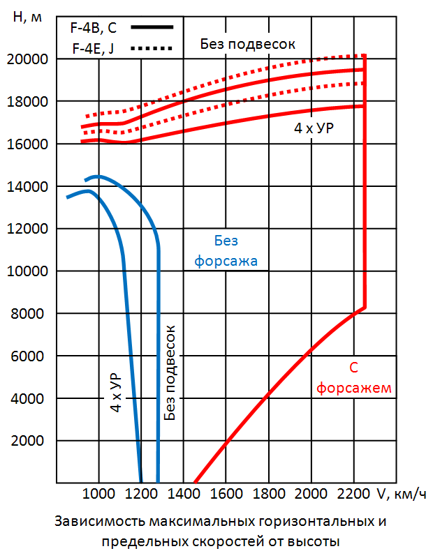 Зависимость максимальных горизонтальных и предельных скоростей от высоты для самолёта F-4 «Фантом-II». По данным Горощенко Б.Т. Основные боевые самолёты США, Великобритании, Франции и Италии. Военно-воздушная инженерная академия им. Н.Е. Жуковского, 1970.